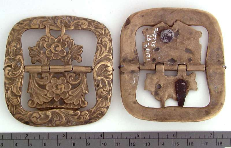 Skospenner støpt i messing fra Øystre Slidre i Oppland. Foto Anne-Lise Reinsfelt / Norsk Folkemuseum, NF.1897-1214.